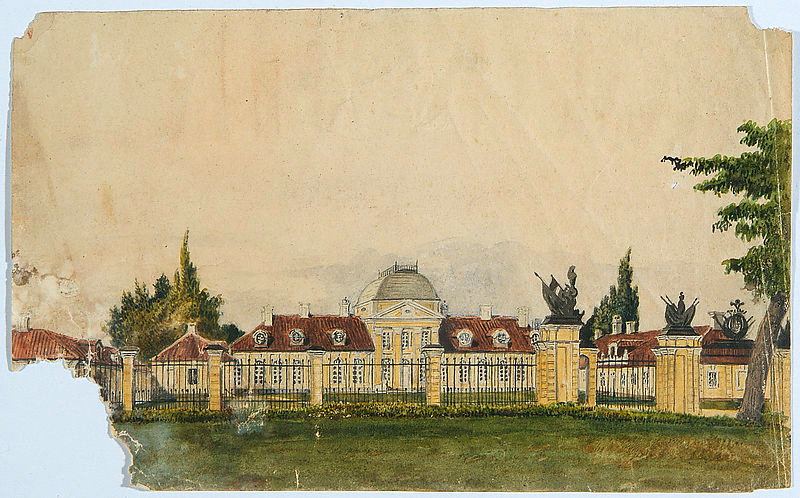 Беларуская (тарашкевіца): Шчорсы (Ščorsy), сядзіба Храптовічаў (Chraptovič)